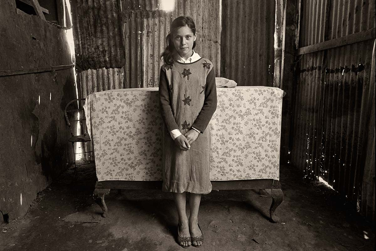 Esta foto de Andy Goldstein pertenece a su serie "Gente en su casa" realizada en 1985.